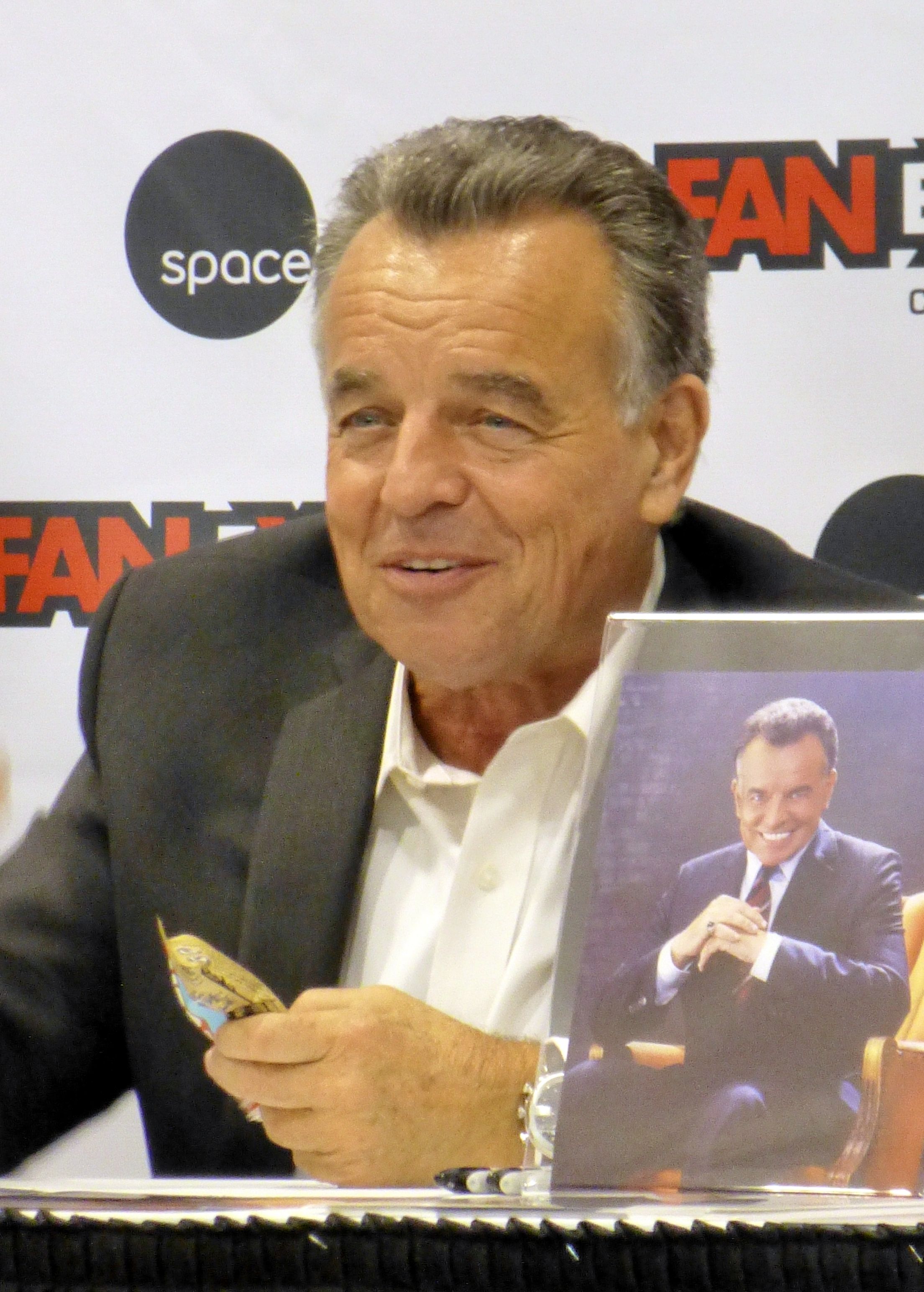 Ray Wise 02 2014 Fan Expo Canada